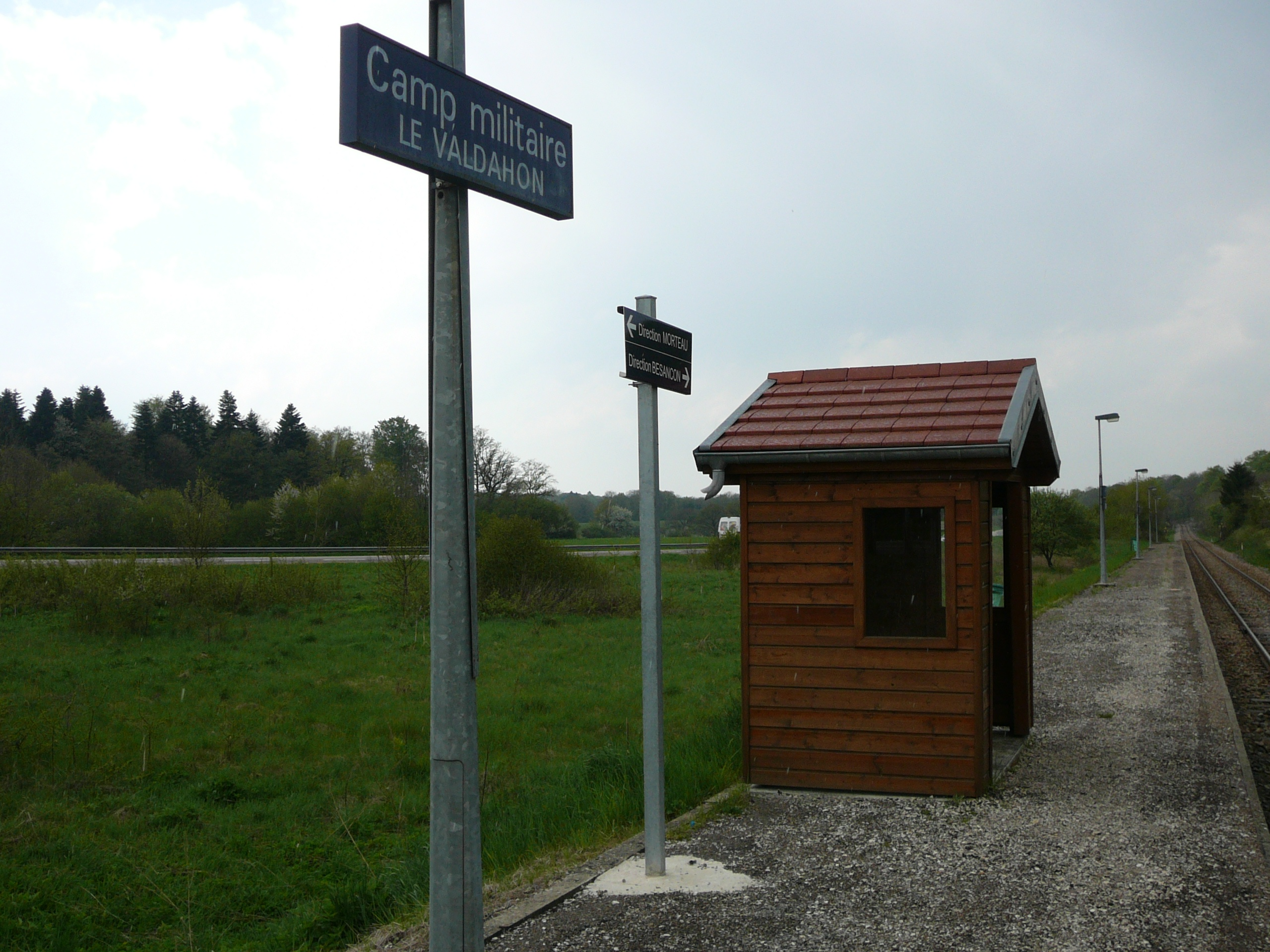 Aubette du camp militaire du Valdahon